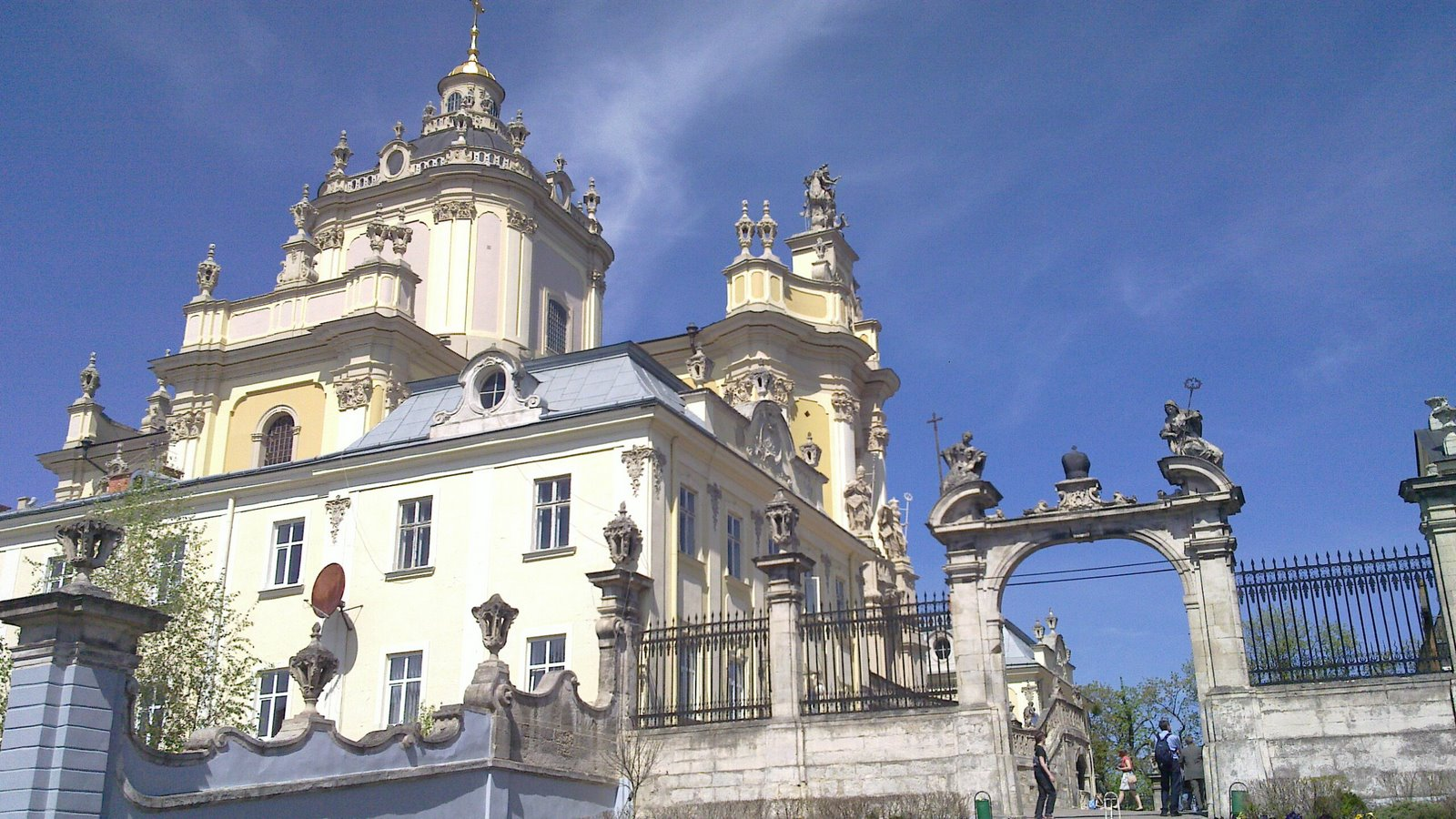 Halytskyi District, Lviv, Lviv Oblast, Ukraine